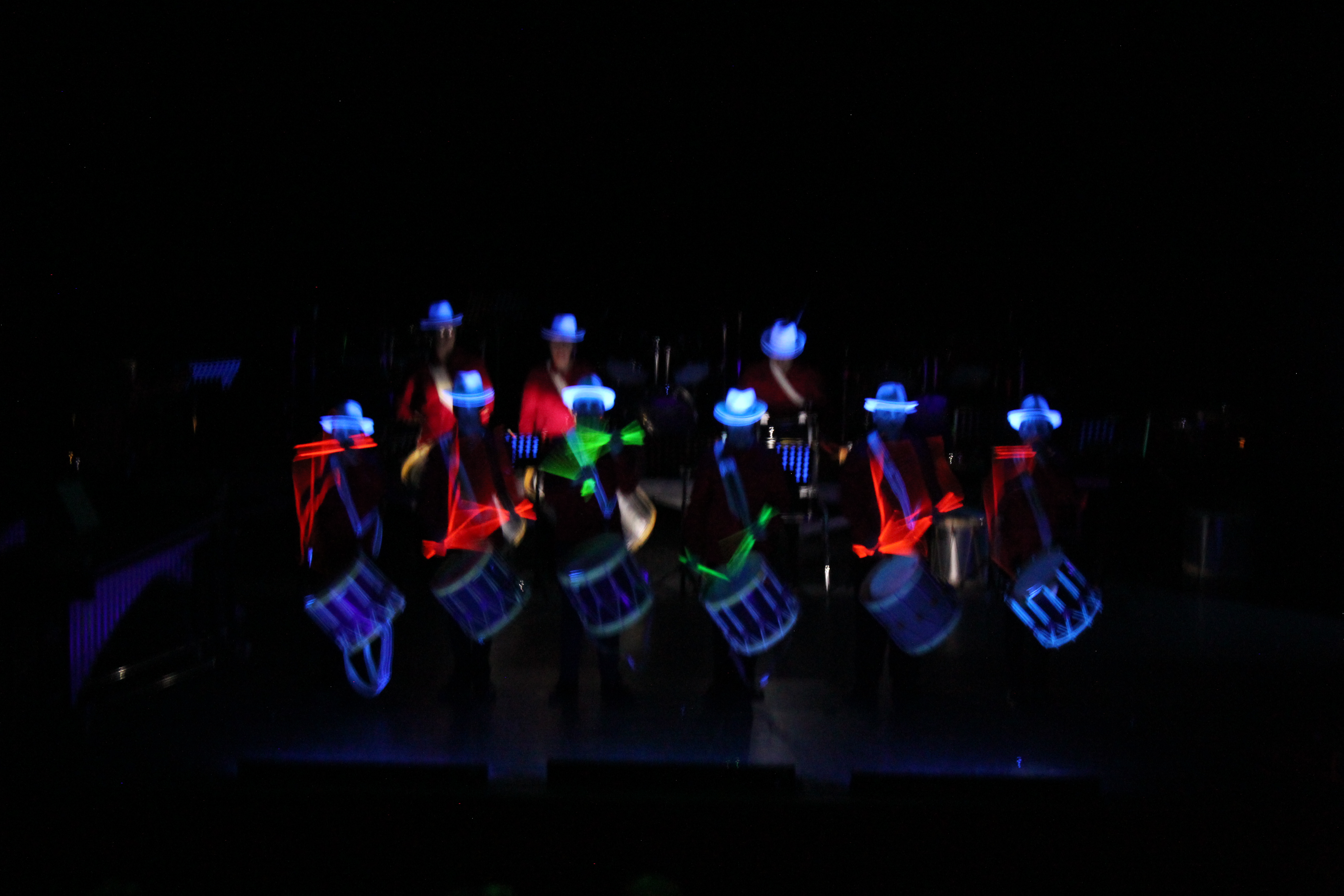 Ensemble de Tambours ave baguettes fluos